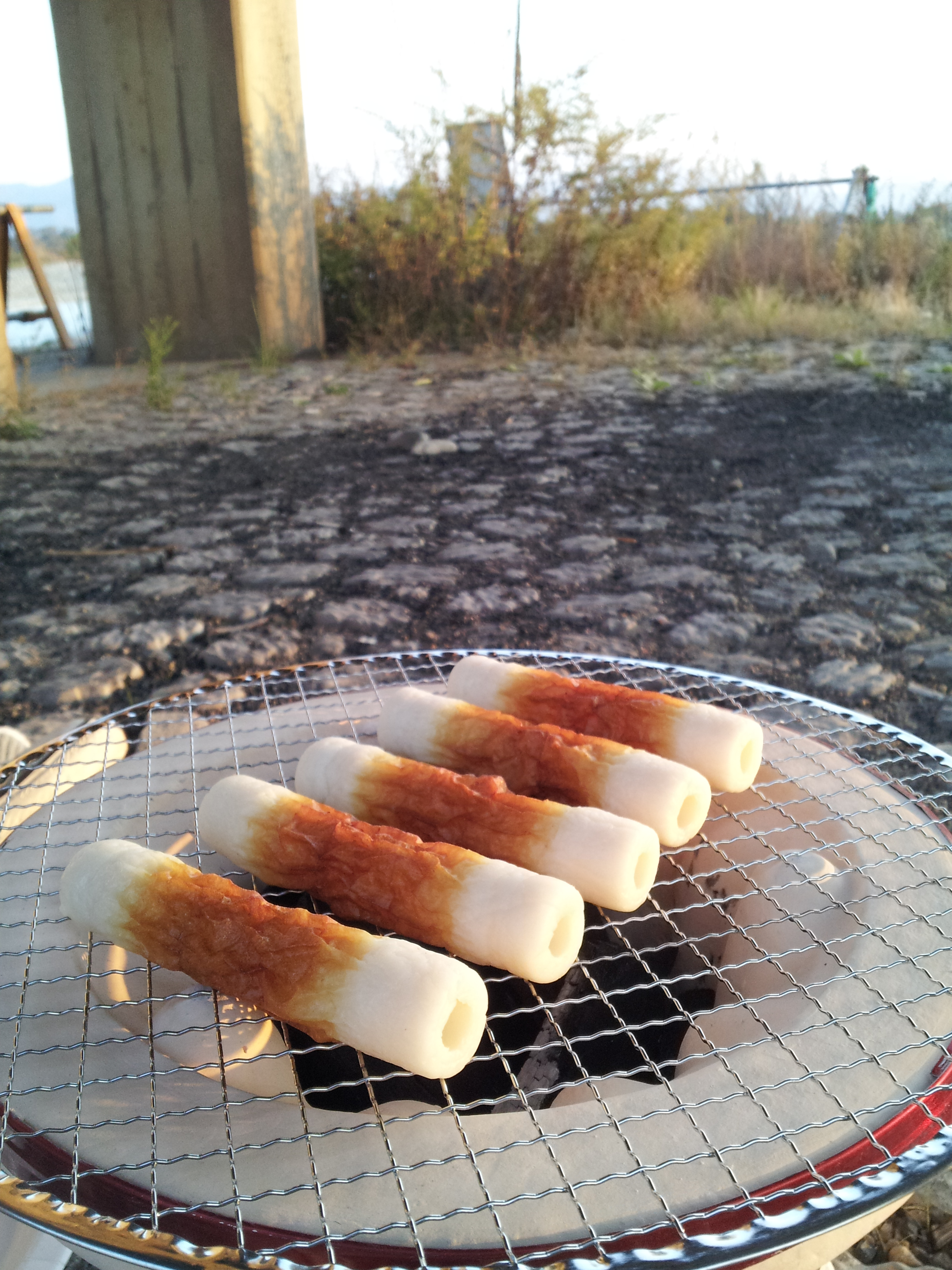 sitirinntikuwa